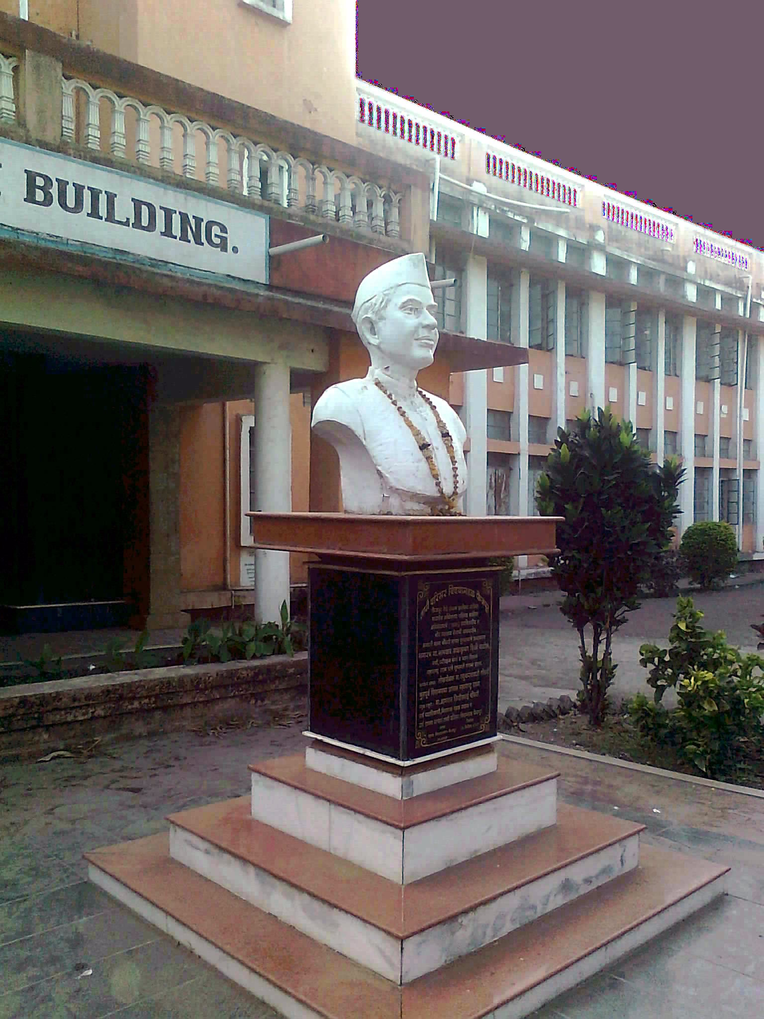 Dhanaji Nana Mahavidyalaya (D N College) at Faizpur (tal- Yawal, dist-Jalgaon, Maharashtra, India)